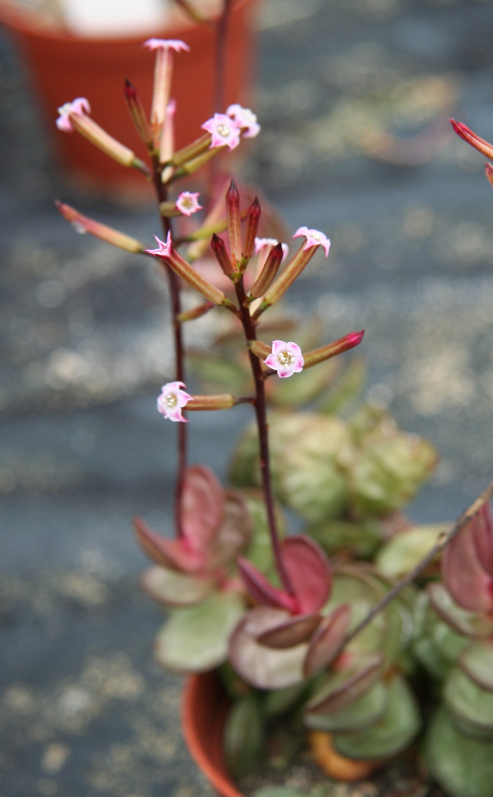 Adromischus subdistichus in der Gärtnerei Flores-Reinecke, Leverkusen